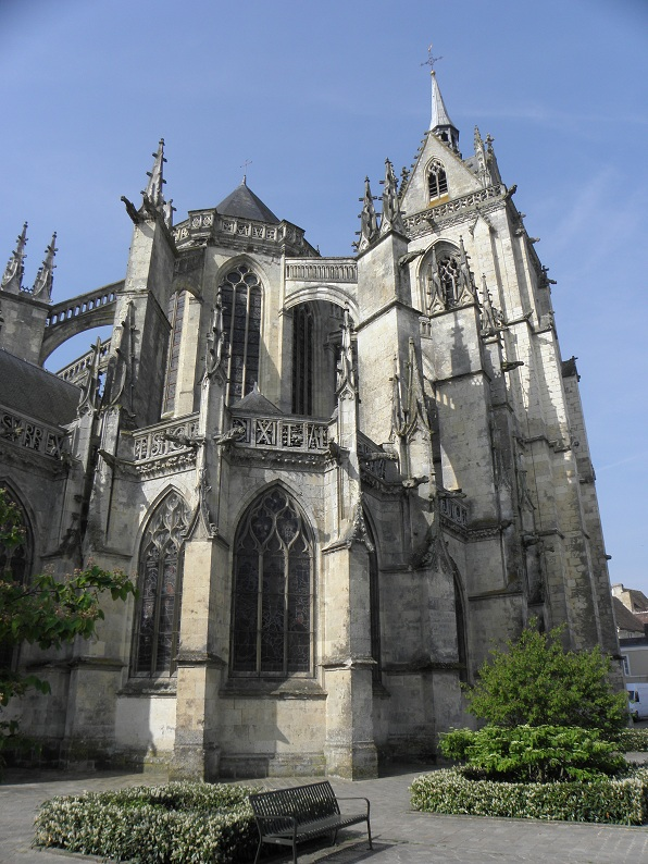 La Ferté-Bernard (dép. de la Sarthe - région Pays de la Loire) – Chevêt et flanc nord de l'église Notre-Dame-des-Marais.